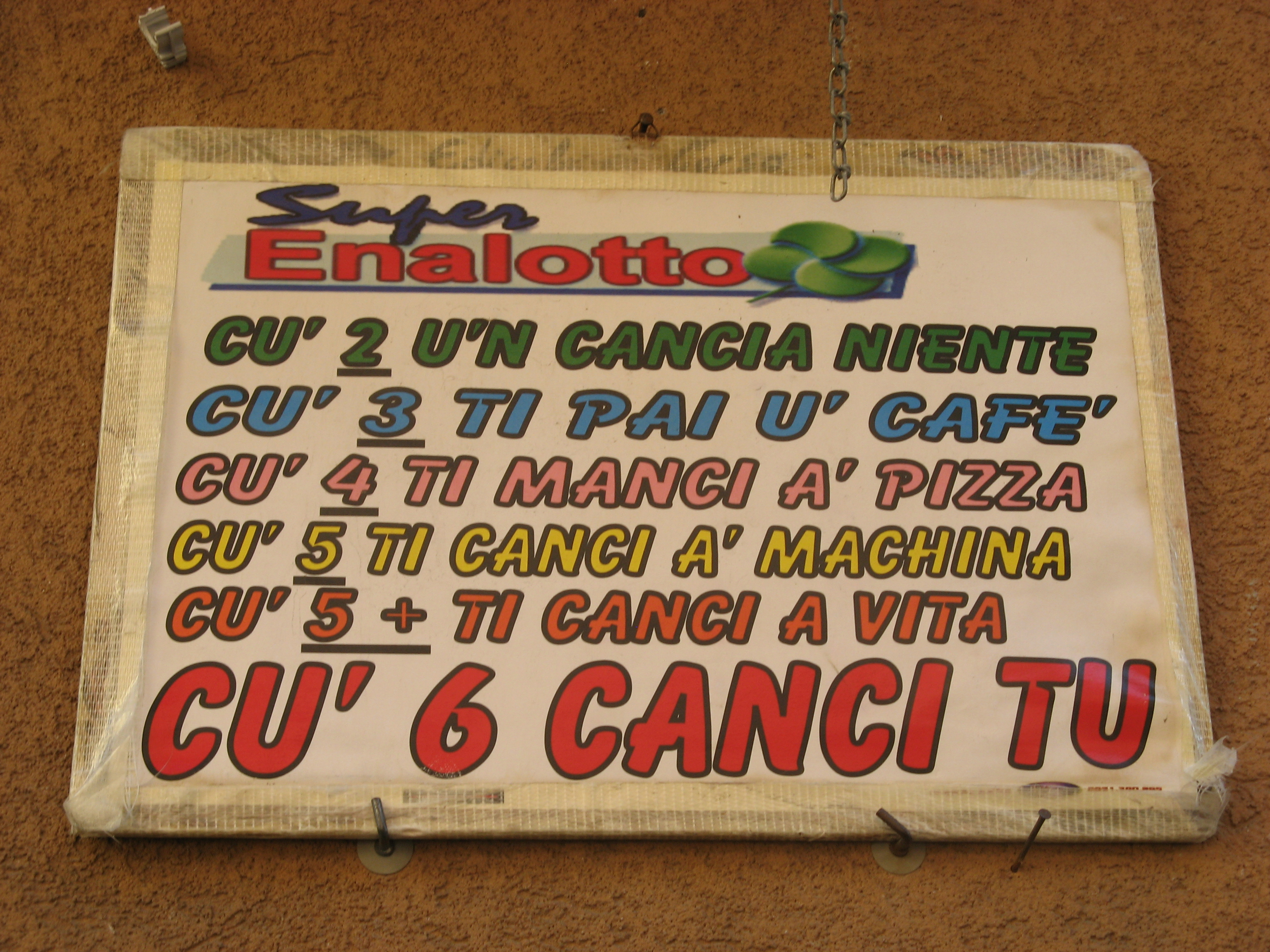 Un simpatico cartello a Santo Stefano di Camastra - Messina.